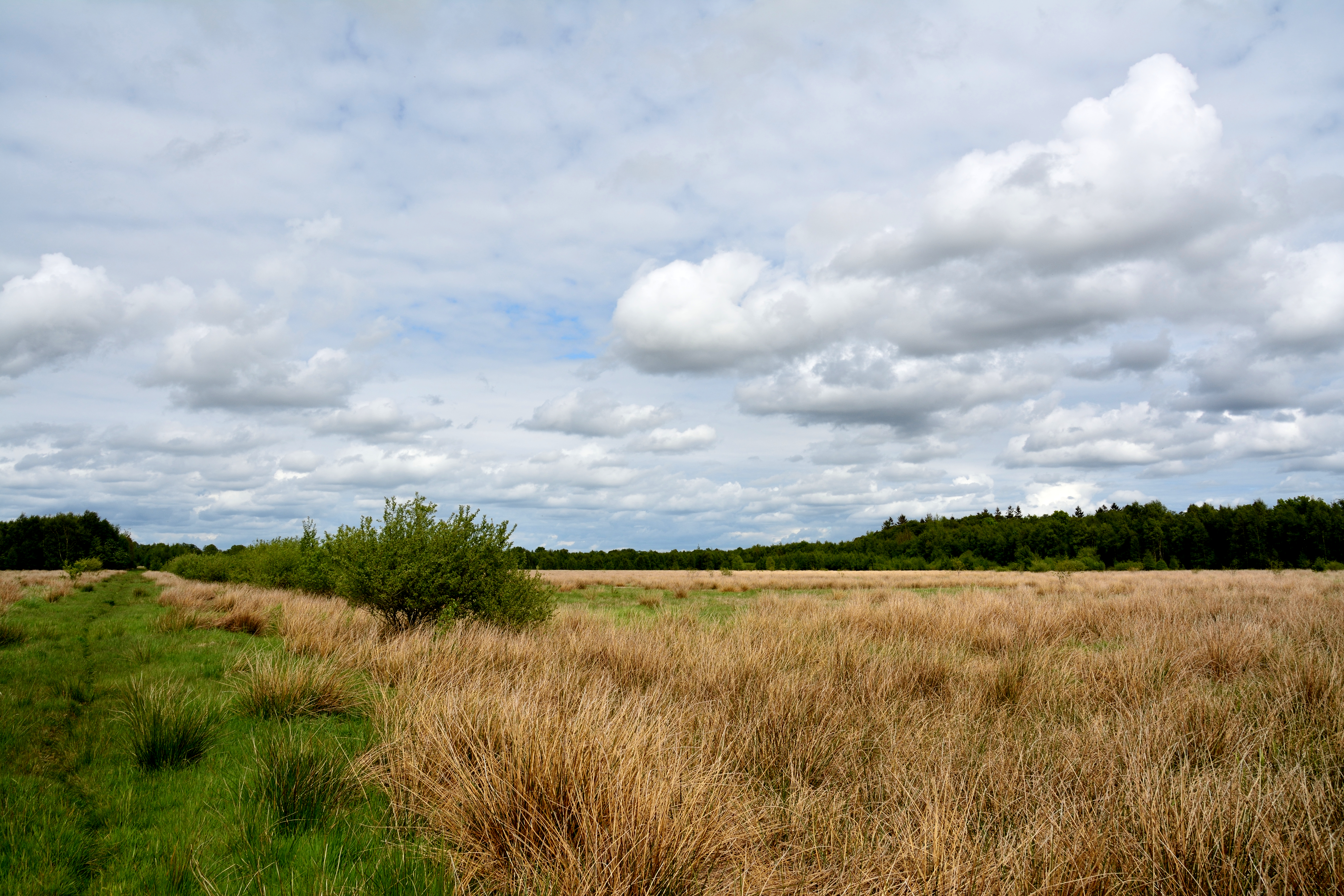 Impressionen aus dem FFH-Gebiet "Moore der Breitenburger Niederung" im Kreis Steinburg, Schleswig-Holstein